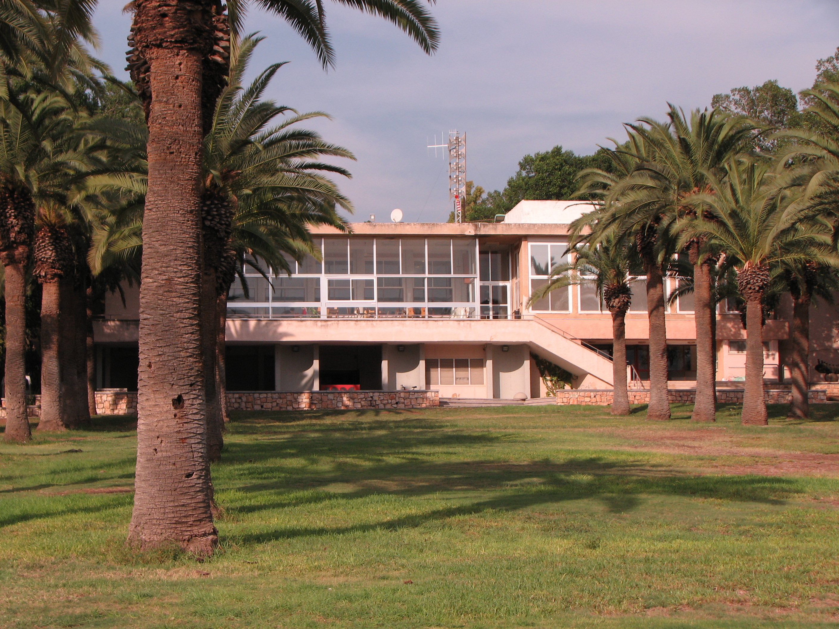 חדר האוכל ודשא הדקלים בין חרוד מאוחד